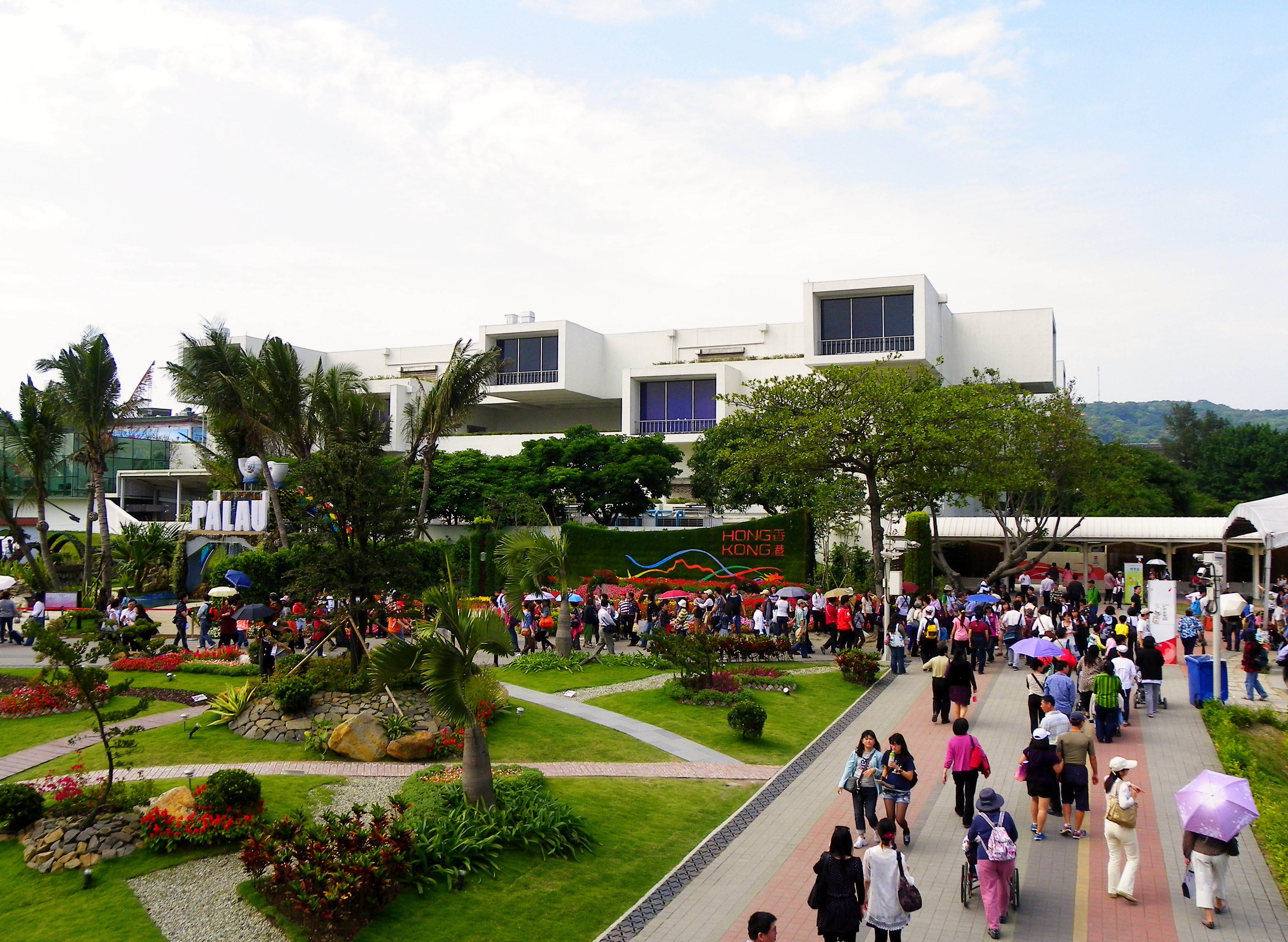 由臺北中山美術公園天橋北望臺北市立美術館東南角。